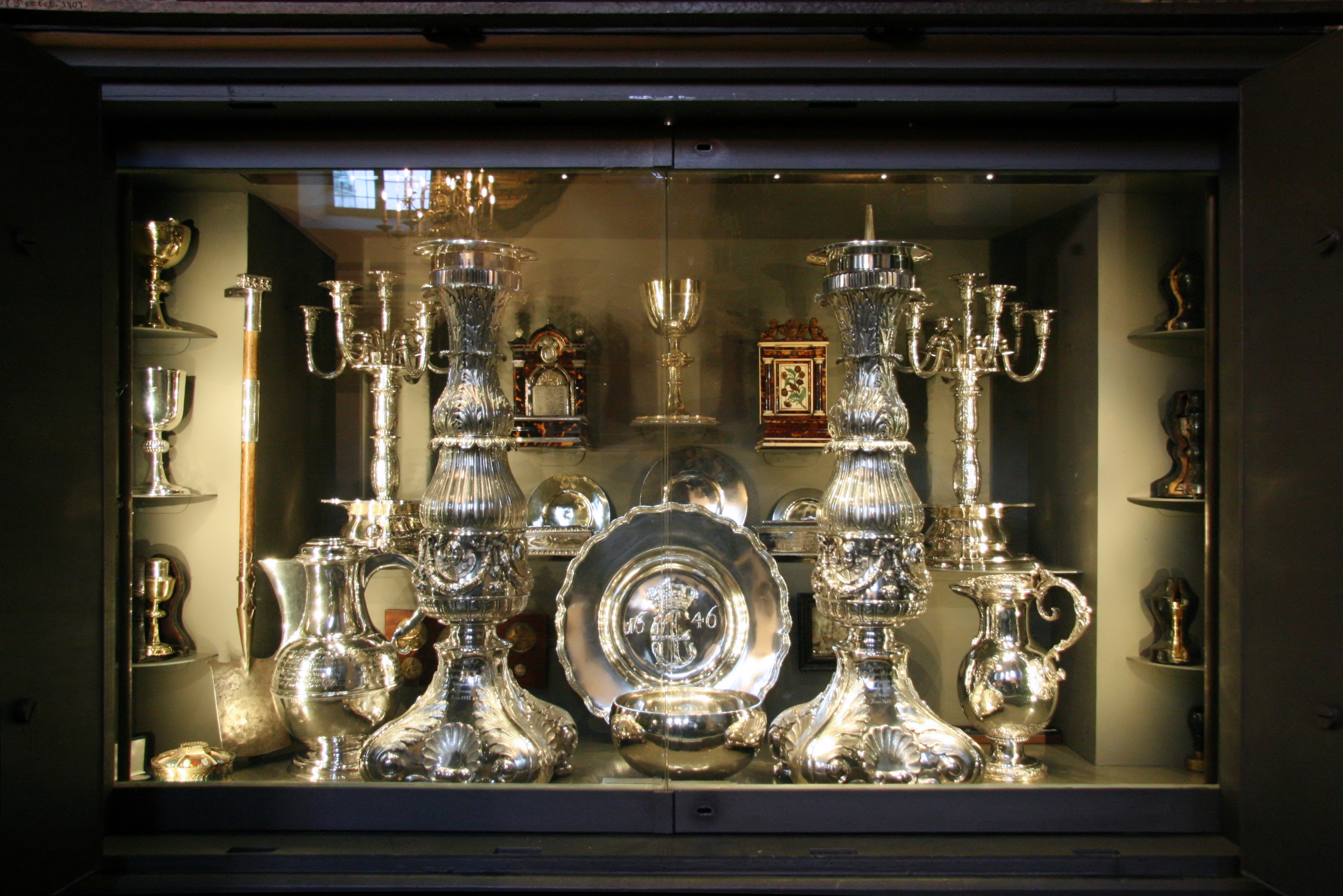 Holmens Kirke, Copenhagen, Denmark . Kirkesølvet i sikkerhedsboksen.